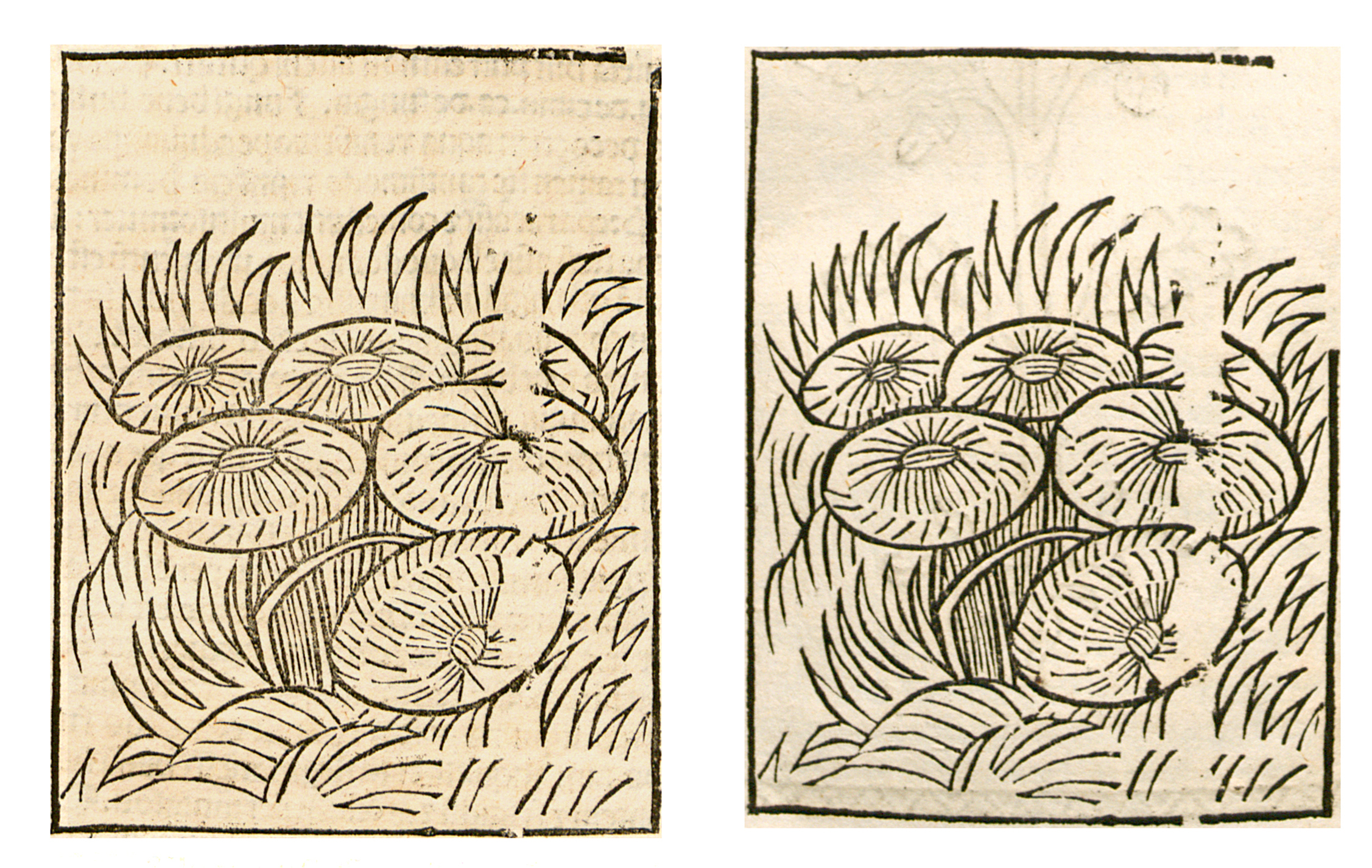 Abbildung von: Pfifferlinge